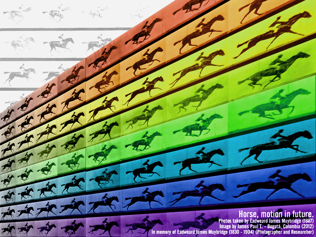 Imagen elaborada por "James Paul T" en homenaje a "Eadweard Muybridge"